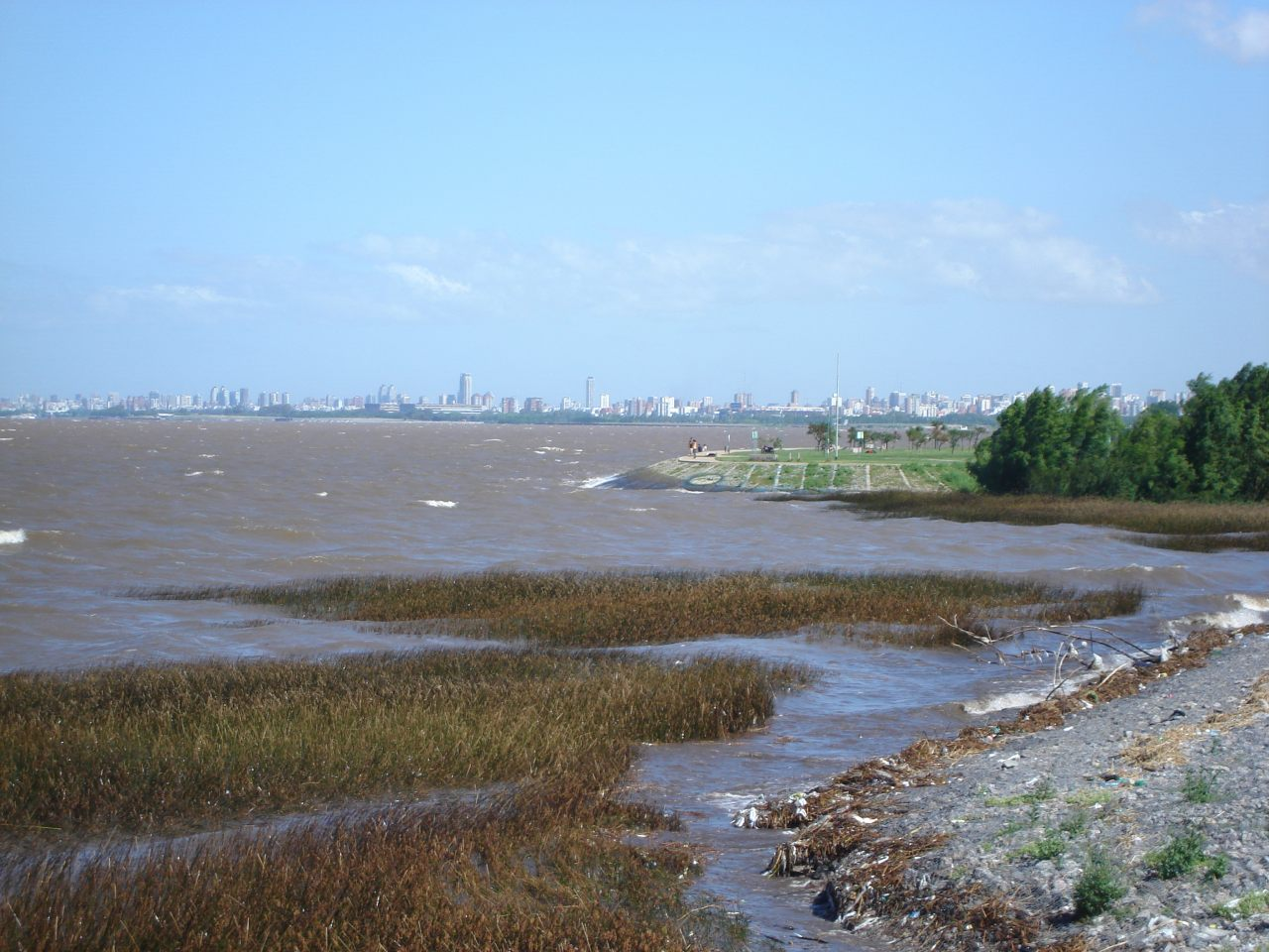 Vista del Río de la Plata desde su costa en Martínez —calle Paraná—, partido de San Isidro, provincia de Buenos Aires, República Argentina. Se observa la línea costera de la Ciudad de Buenos Aires al fondo.